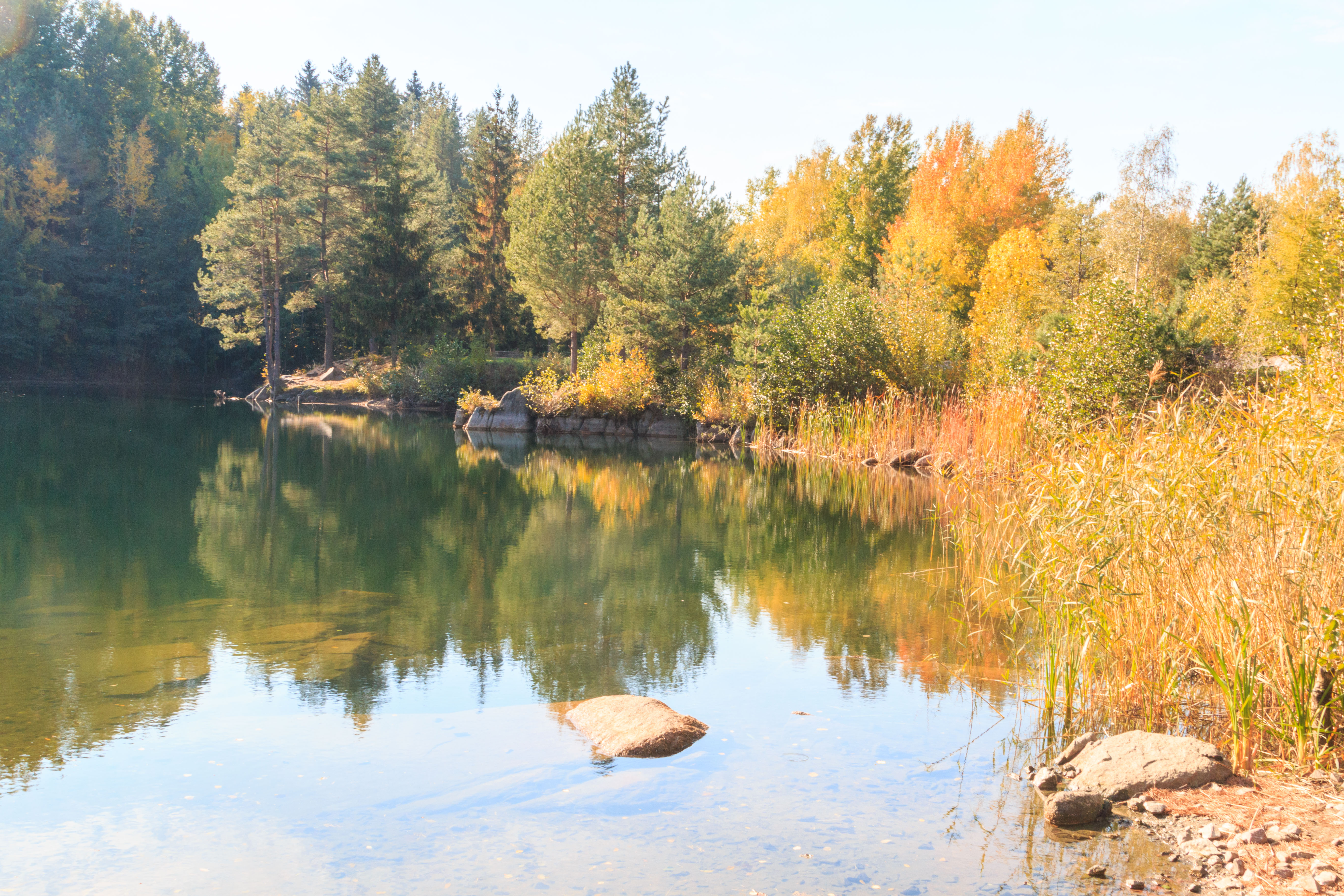 Lomová jezírka u Švihůvku Project: Vodstvo. Ticket: 1617.